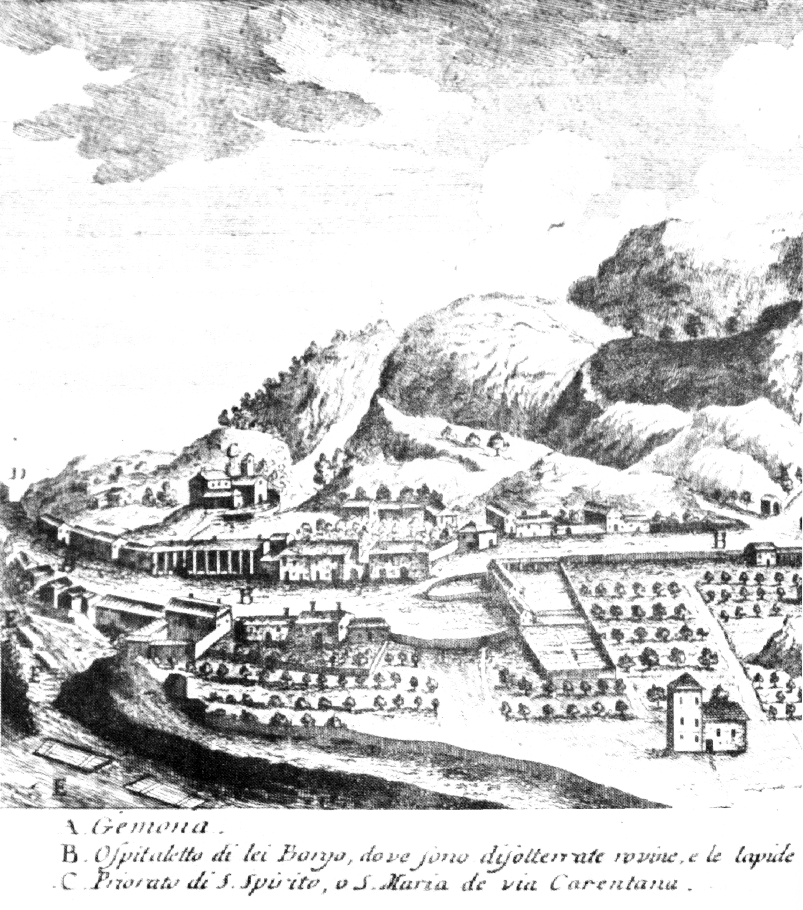 Ospedaletto di Gemona del Friuli, stampa dalla pubblicazione - Notizie di Gemona antica città del Friuli - Gian Giuseppe Liruti - Venezia 1770